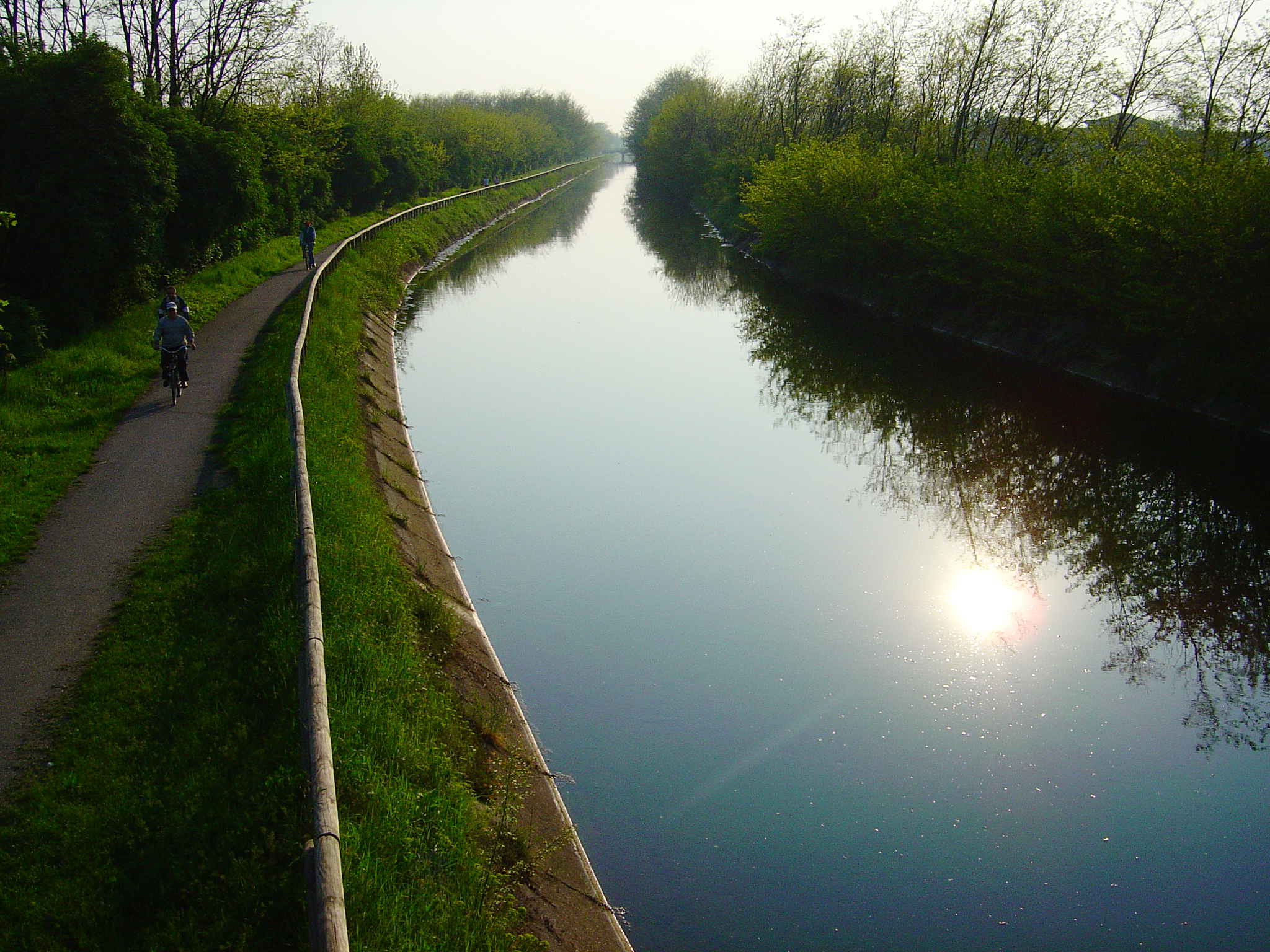 Canale Villoresi a Villastanza di Parabiago This is a photo of a monument which is part of cultural heritage of Italy.